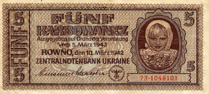 П'ять карбованців Райхскомісаріату Україна (Рівне). Аверс.